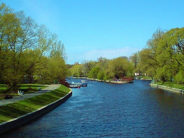 Река Кркстовка с Мало-Крестовского моста